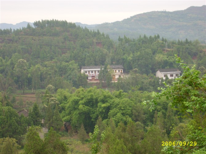 蓬安县太极村农村景色